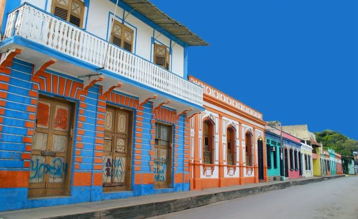 Casco histórico de la ciudad